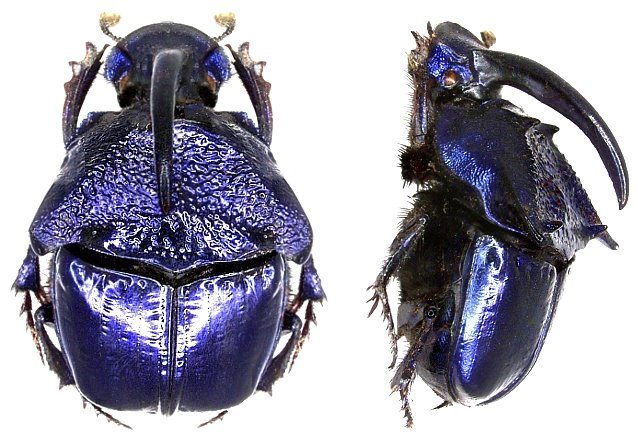 Familie: Scarabaeidae Grösse: 13-23 mm Verbreitung: Mexiko, Arizona Fundort: Mexiko, Almoloya del Rio, 1981 det. U.Schmidt, 2006 Foto: U.Schmidt, 2006